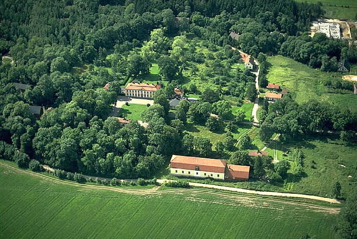 Motiv: Grensholms herrgård Nyckelord: Byggnadsminnen, Flygbilder, Riksintressen Kategori: Herrgårds-/slottslandskapGrensholms herrgård